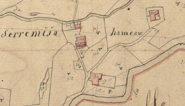 Serramitja, de la Bastida, en el Cadastre napoleònic del 1812 (Arxius Departamentals dels Pirineus Orientals)